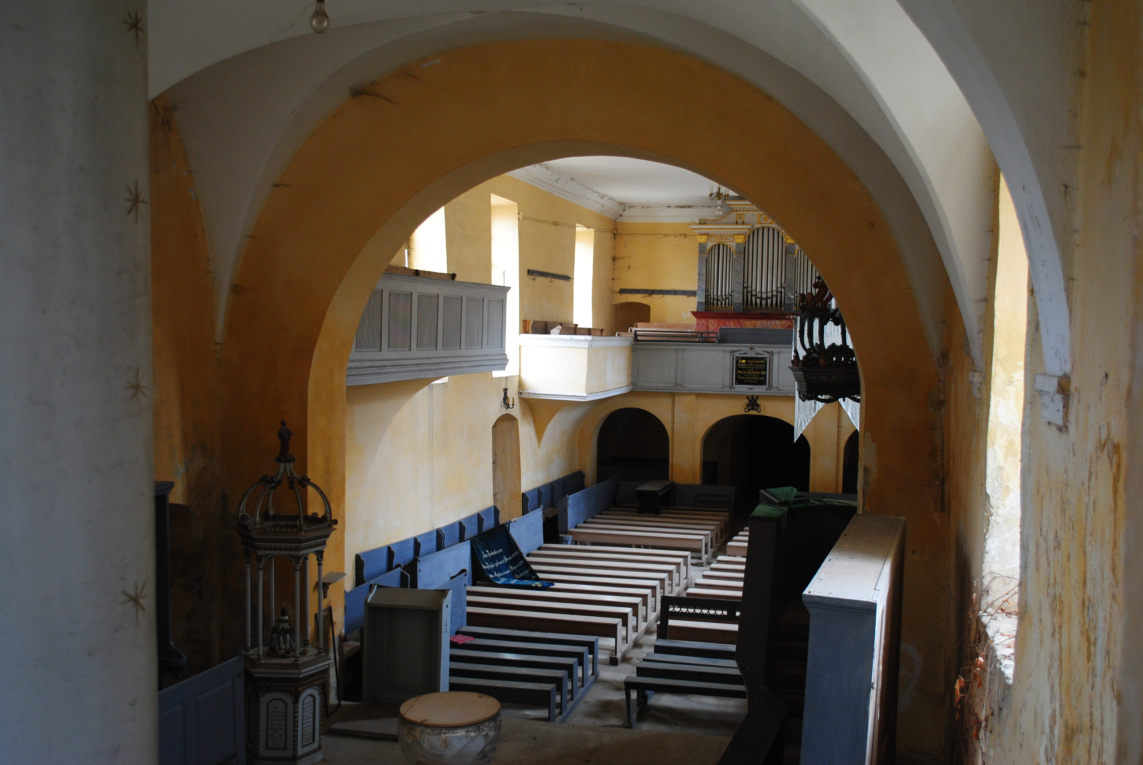 Ansamblul bisericii evanghelice fortificate, sf. sec. XV - sec. XIX